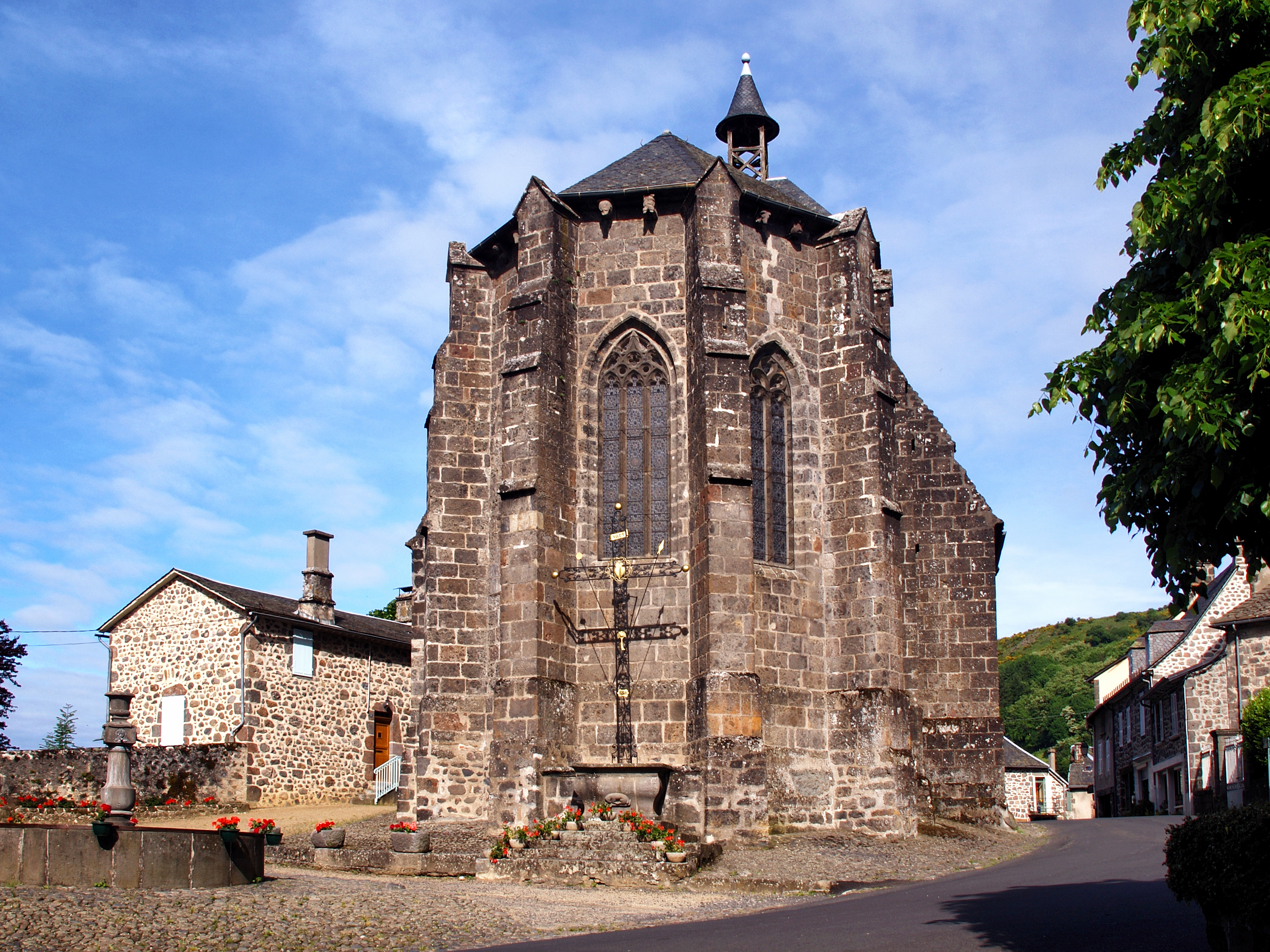 Saint-Martin-Valmeroux, Cantal (Auvergne-Rhône-Alpes) - L'église Saint-Martin des XIIIe-XIVe siècles, classée .